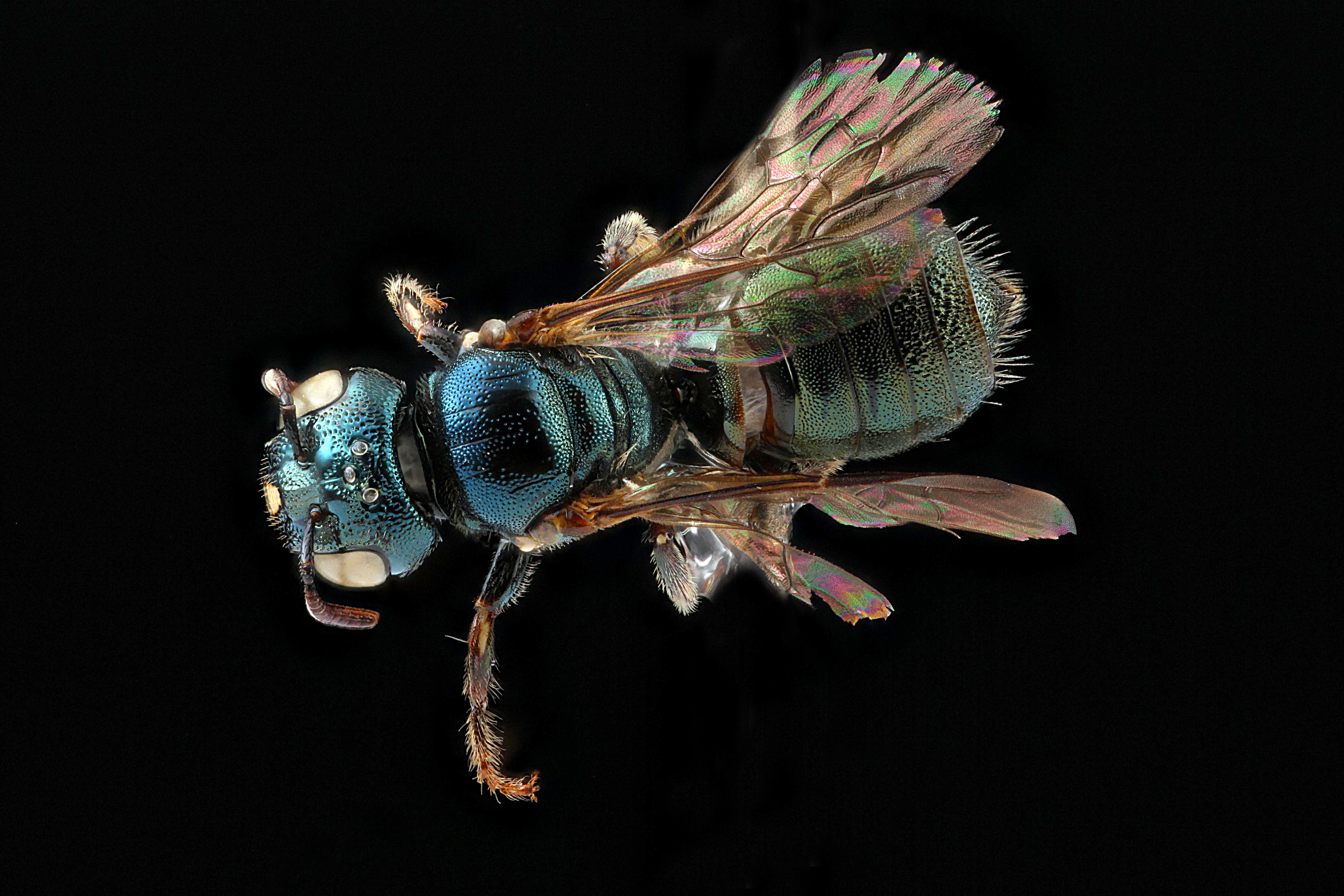 Ceratina strenua, female